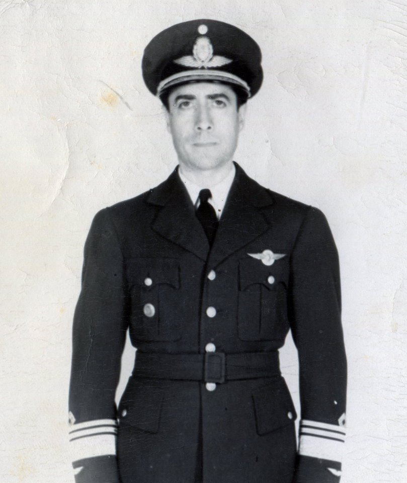 El Brigadier General Manuel Lisardo Aleman.